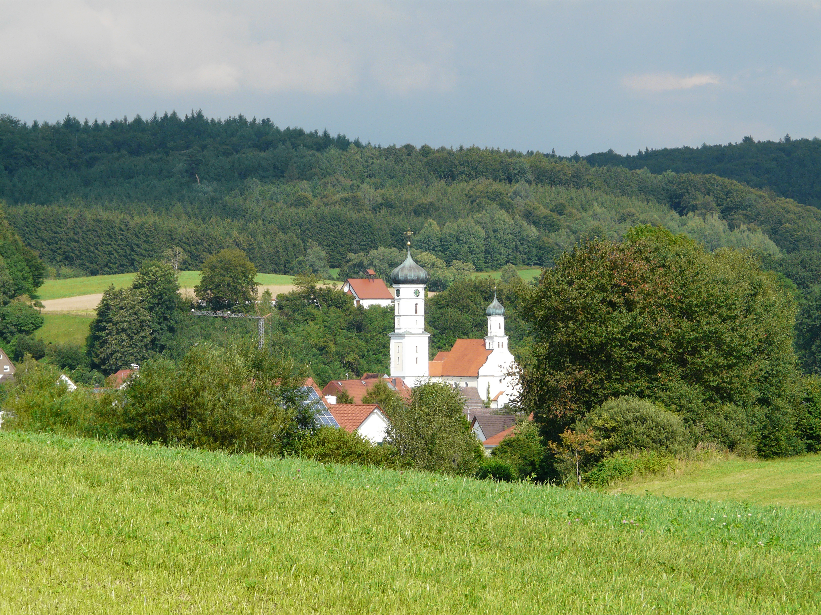 Obergessertshausen von Nordwesten, Aichen